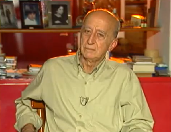 O jornalista e humorista Millôr Fernandes em entrevista ao programa Observatório da Imprensa, da TV Brasil.